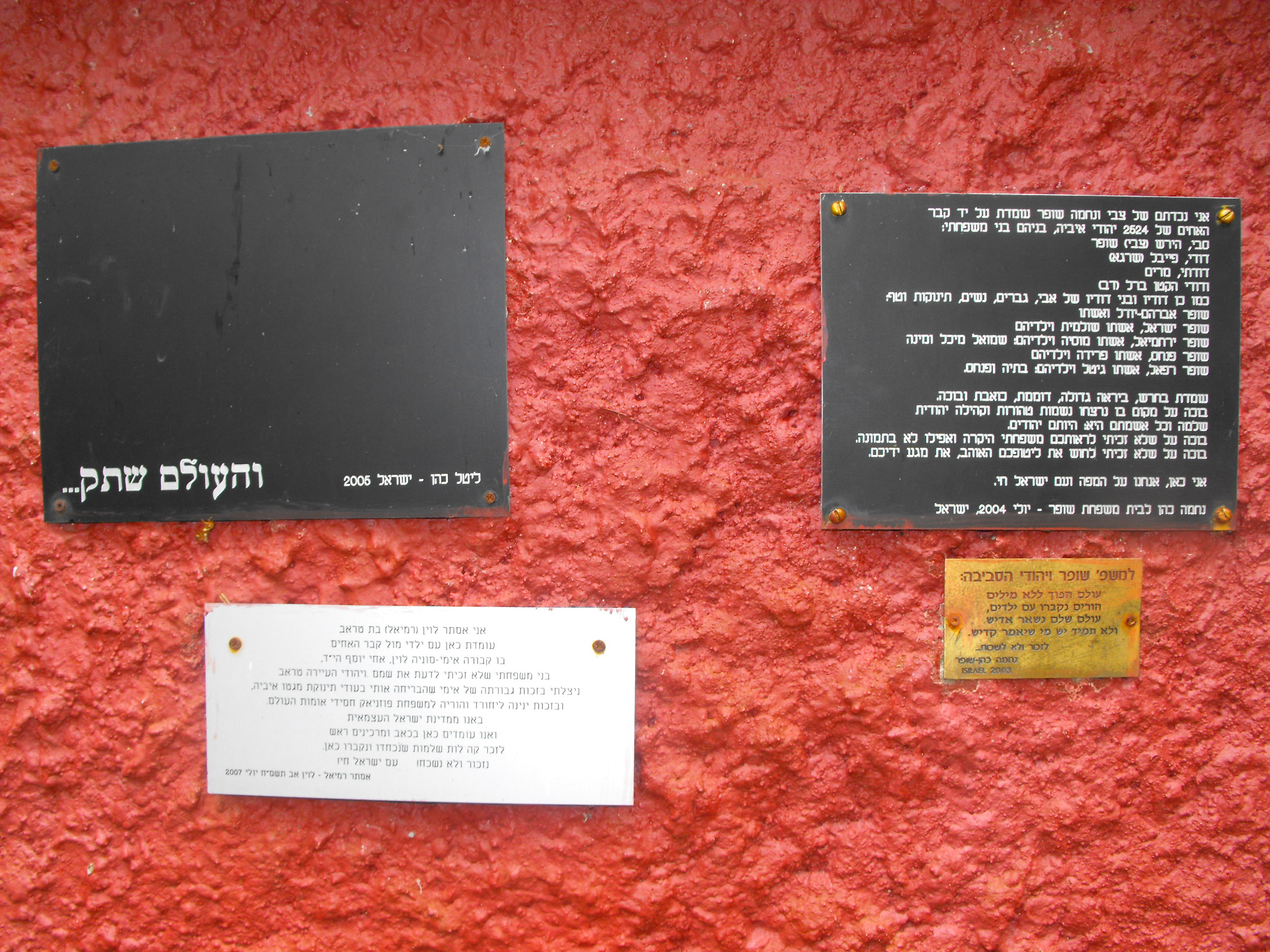 Памятные таблички и надписи на стене мемориального комплекса на месте убийства евреев Ивье нацистами и полицаями в 1941-1942 годах. Мемориальный комплекс находится рядом с Ивье, у деревни Стоневичи (урочище Стоневичи), у дороги H-6147.